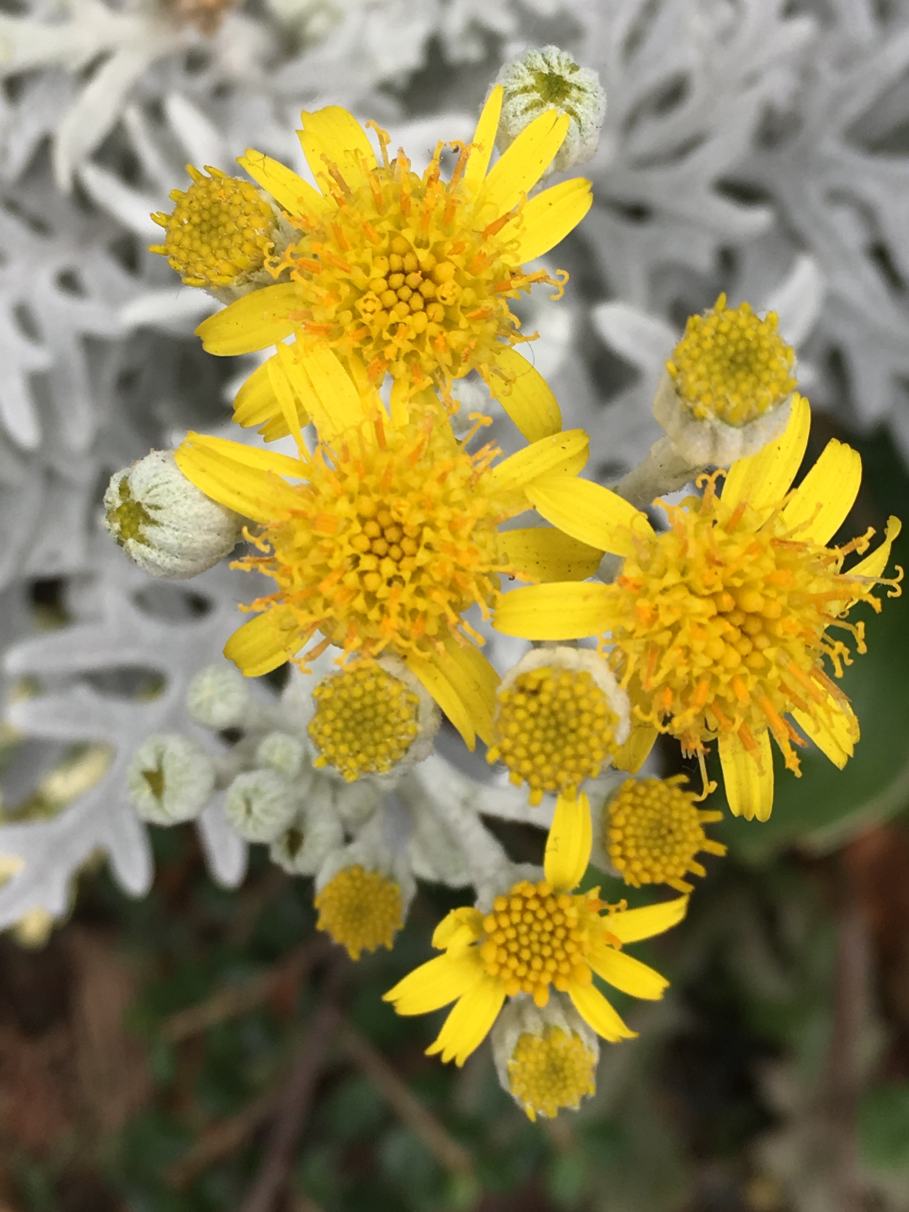 Starzec popielny, spotkany w Gdańsku-Wrzeszczu.